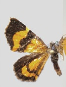 Hagnagora vittata